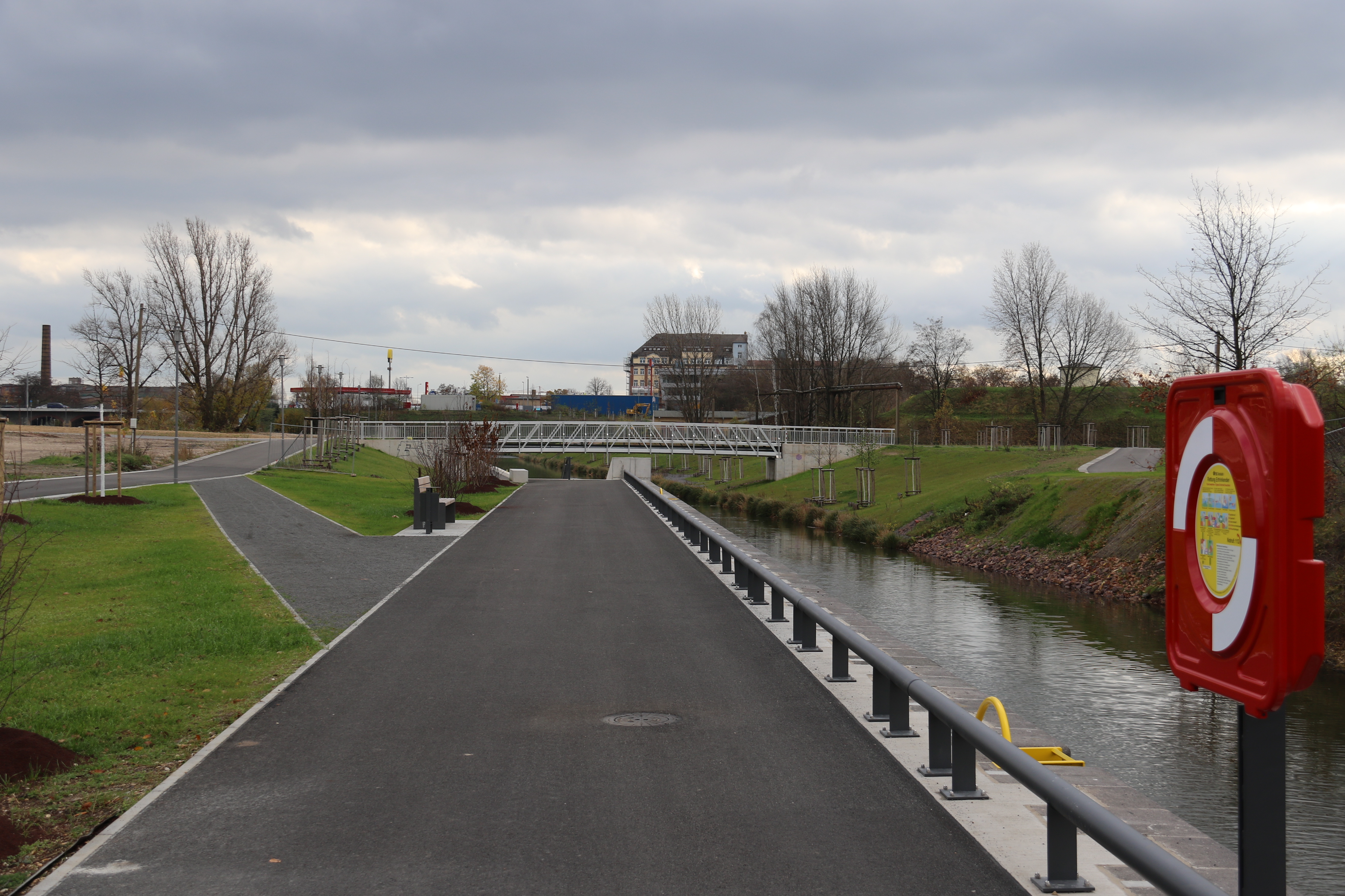 Weg am Verbindungskanal